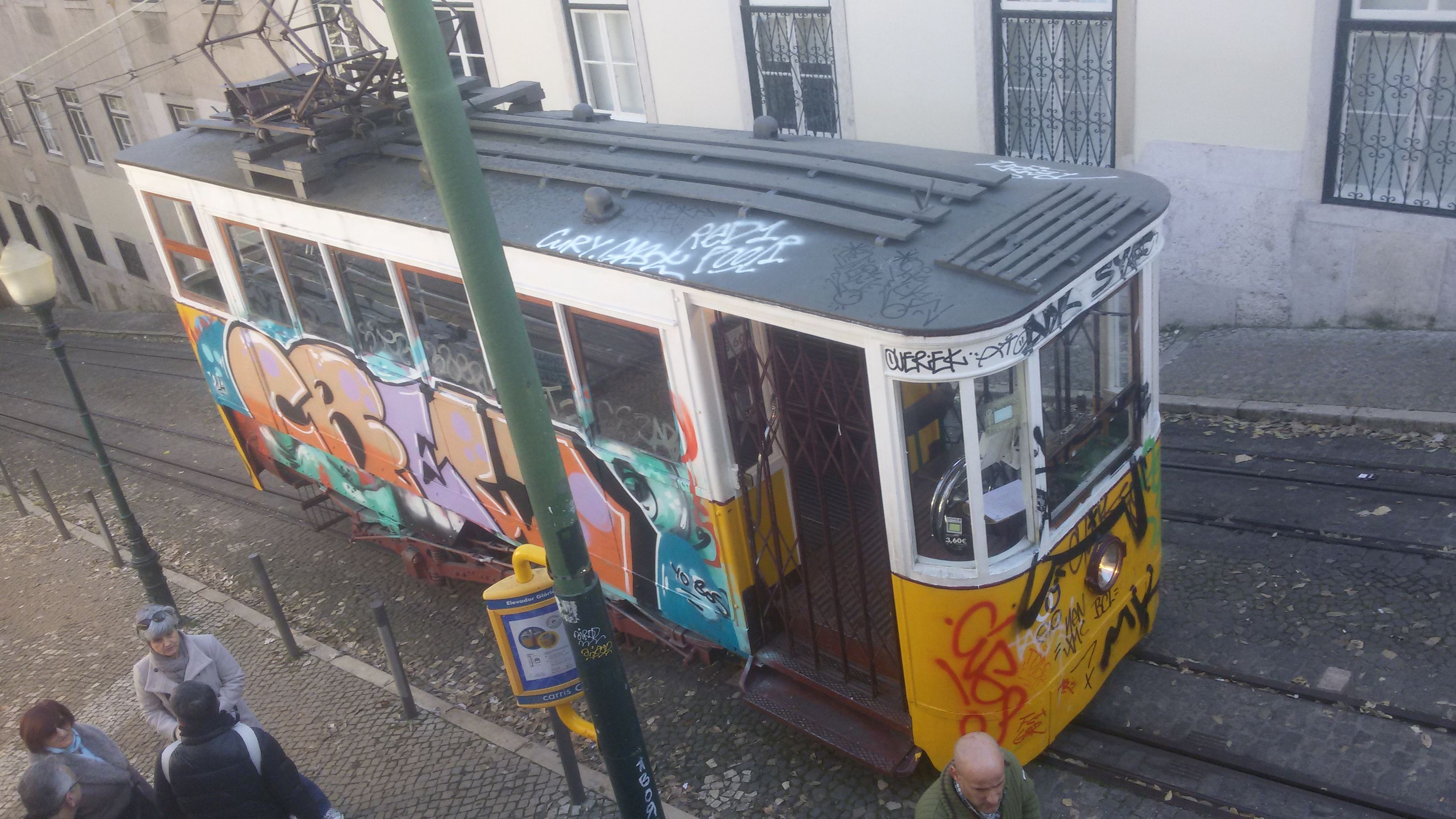 Funicolare di Lisbona